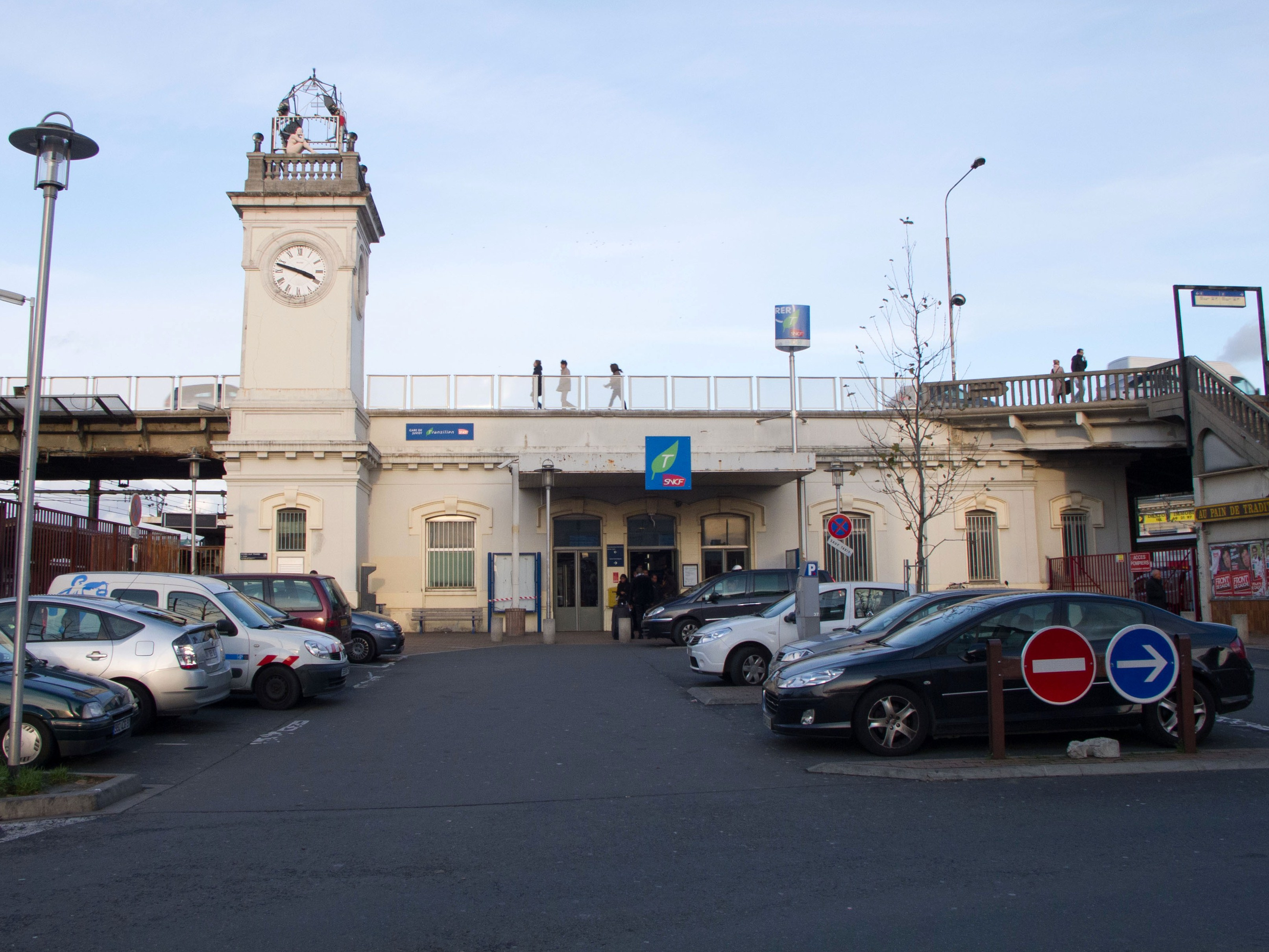 Gare de Juvisy, Juvisy, Essonne, France